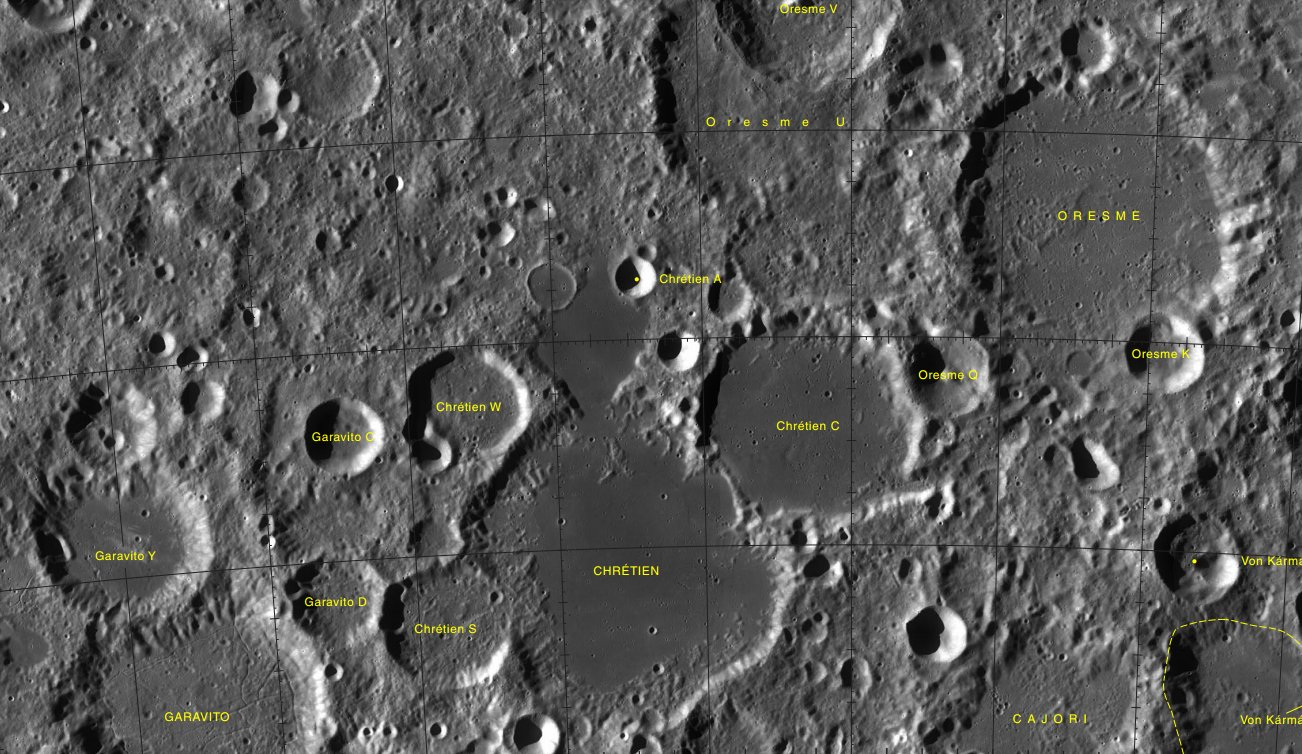 Cráter Chrétien (LRO)